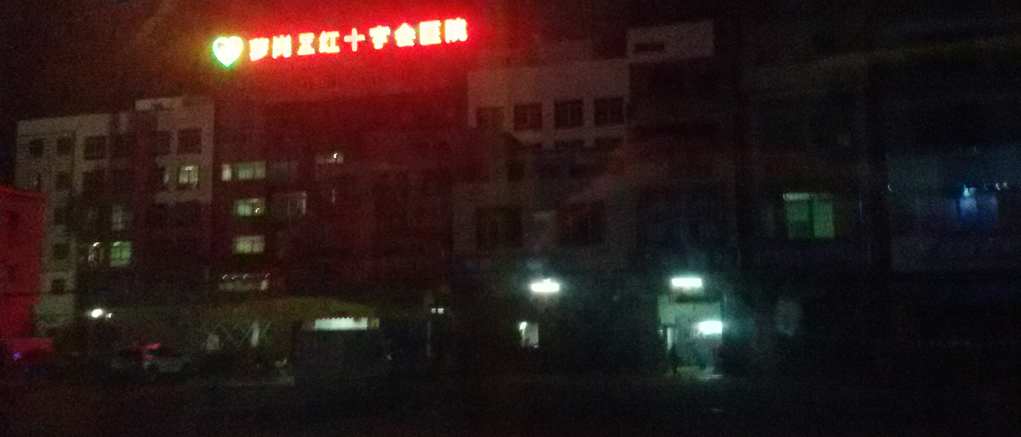 粵語: 萝岗区红十字会医院